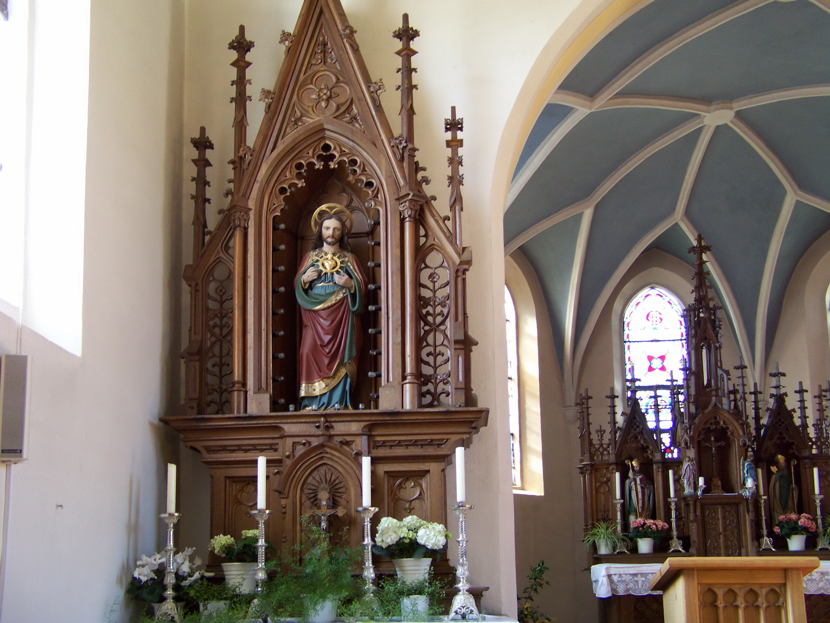 Laberweinting, Franken 13, katholische Expositurkirche St. Nikolaus. Linker Seitenaltar mit der Figur 'Herz-Jesu'